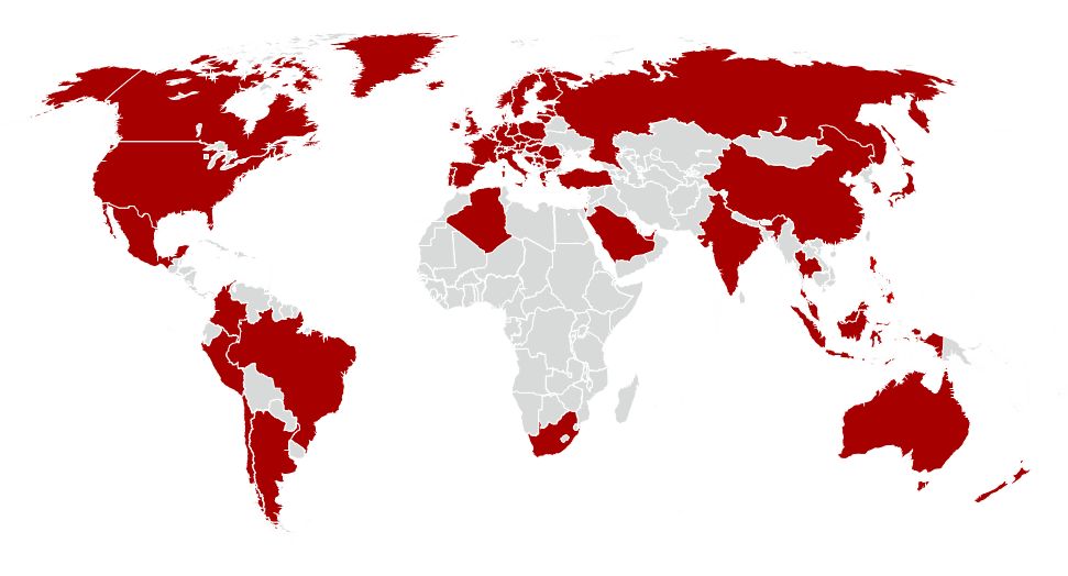 Bancos centrales miembros del BPI